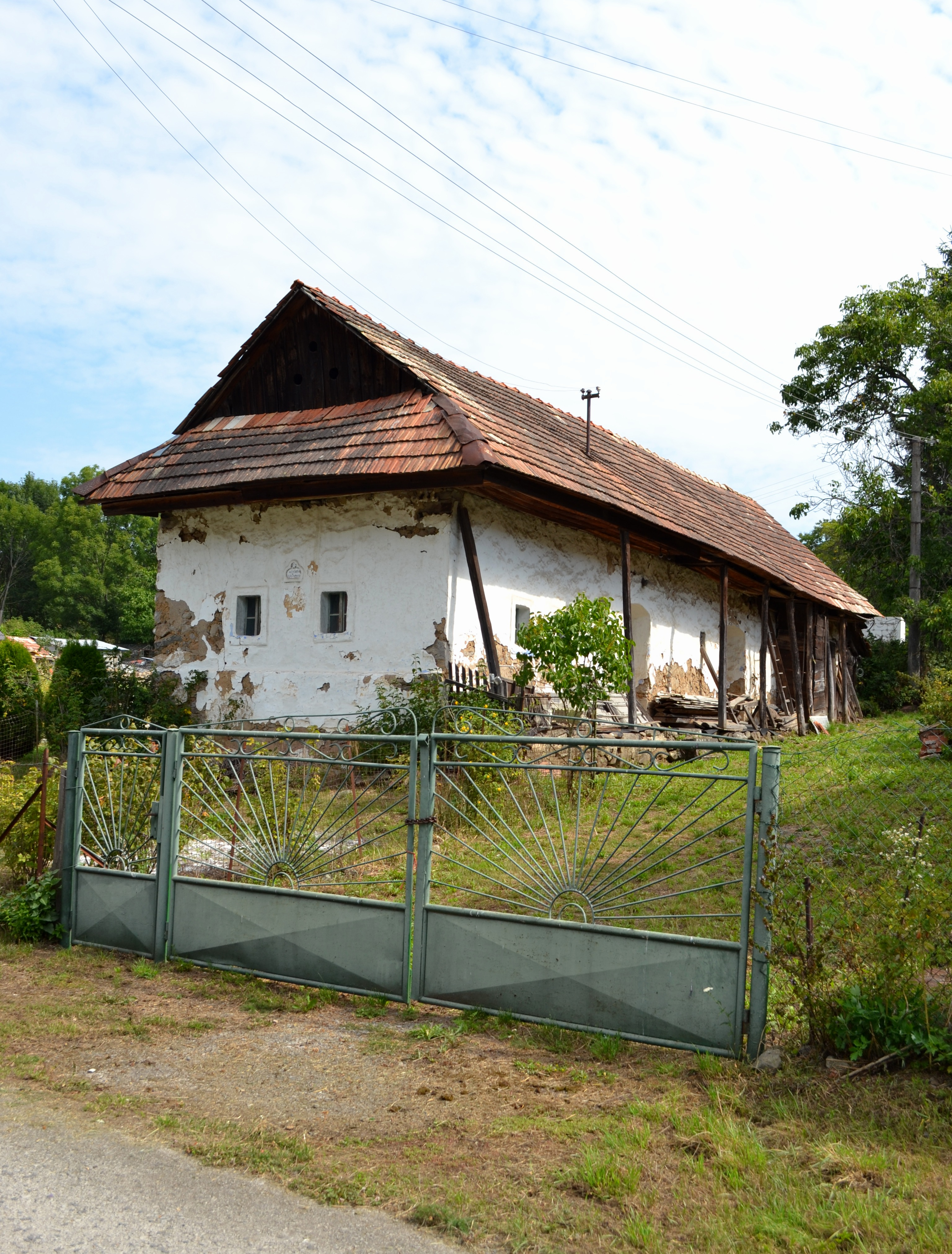 Ľudový č. 61 v Dačovom Lome